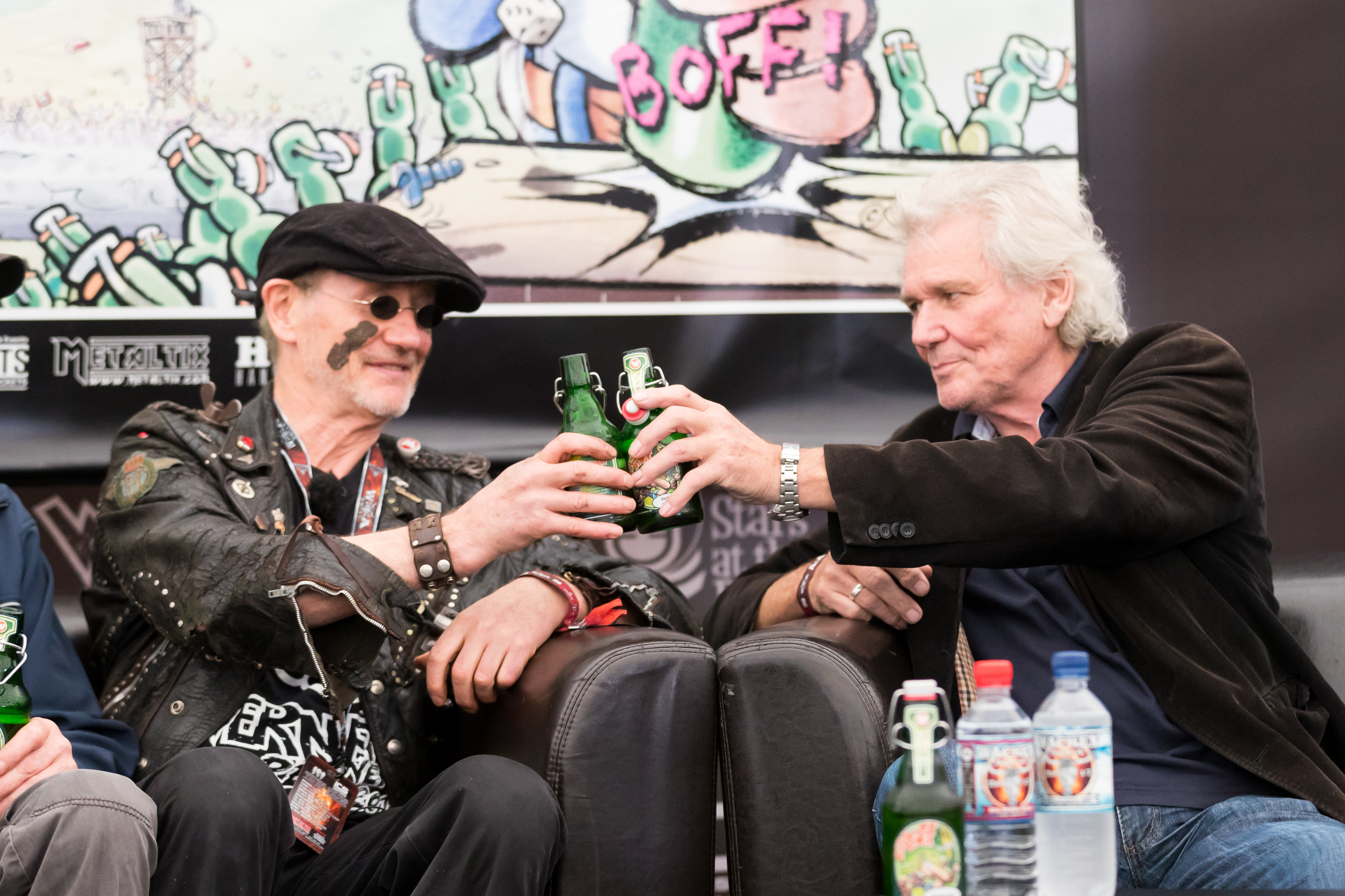 PK Werner das Rennen during Wacken Open Air at Schleswig-Holstein, Wacken, , Germany on 2017-08-04, Photo: Sven Mandel